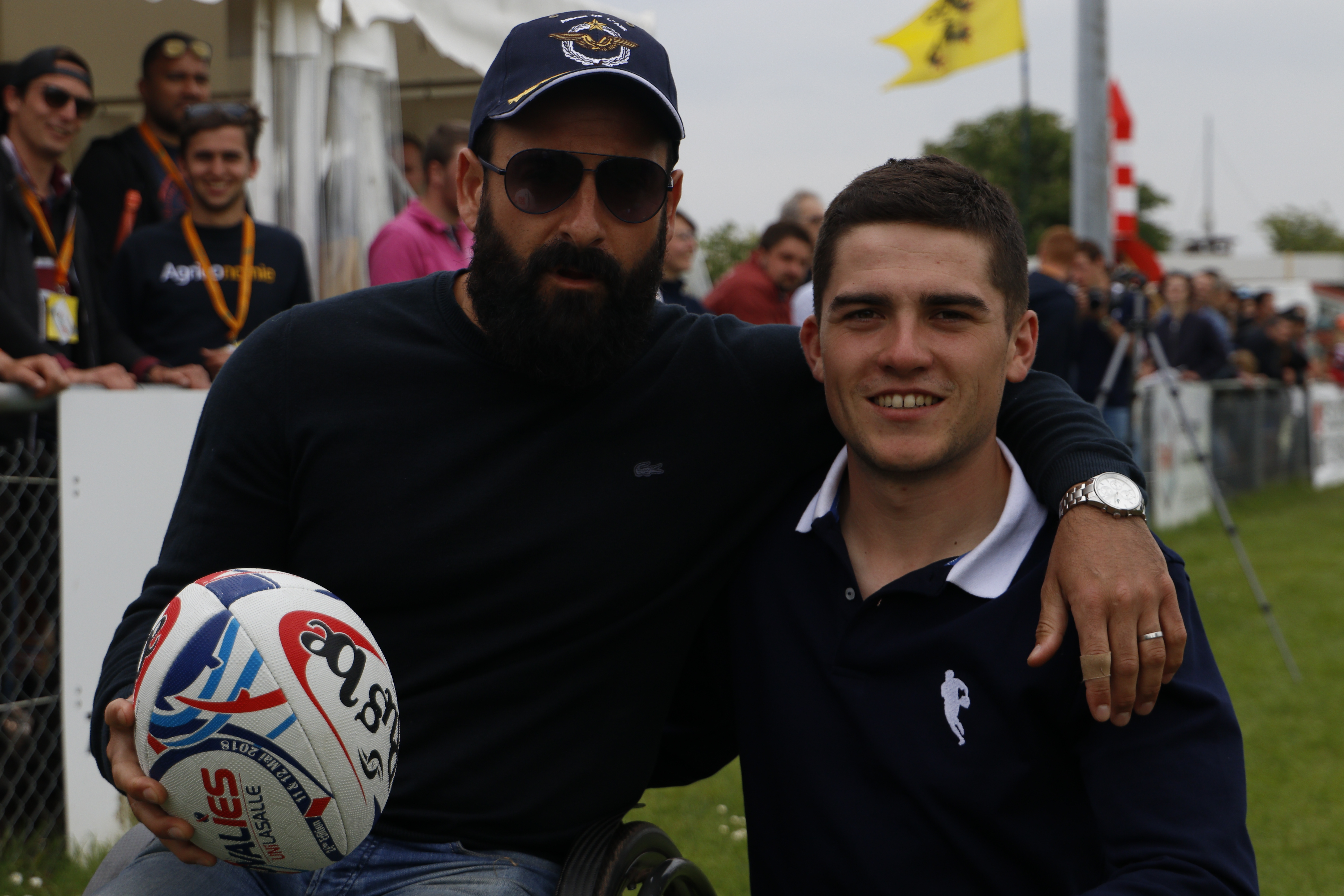 Michaël Jeremiasz, parrain des 24èmes Ovalies, avec Guillaume Marre, président des 24èmes Ovalies